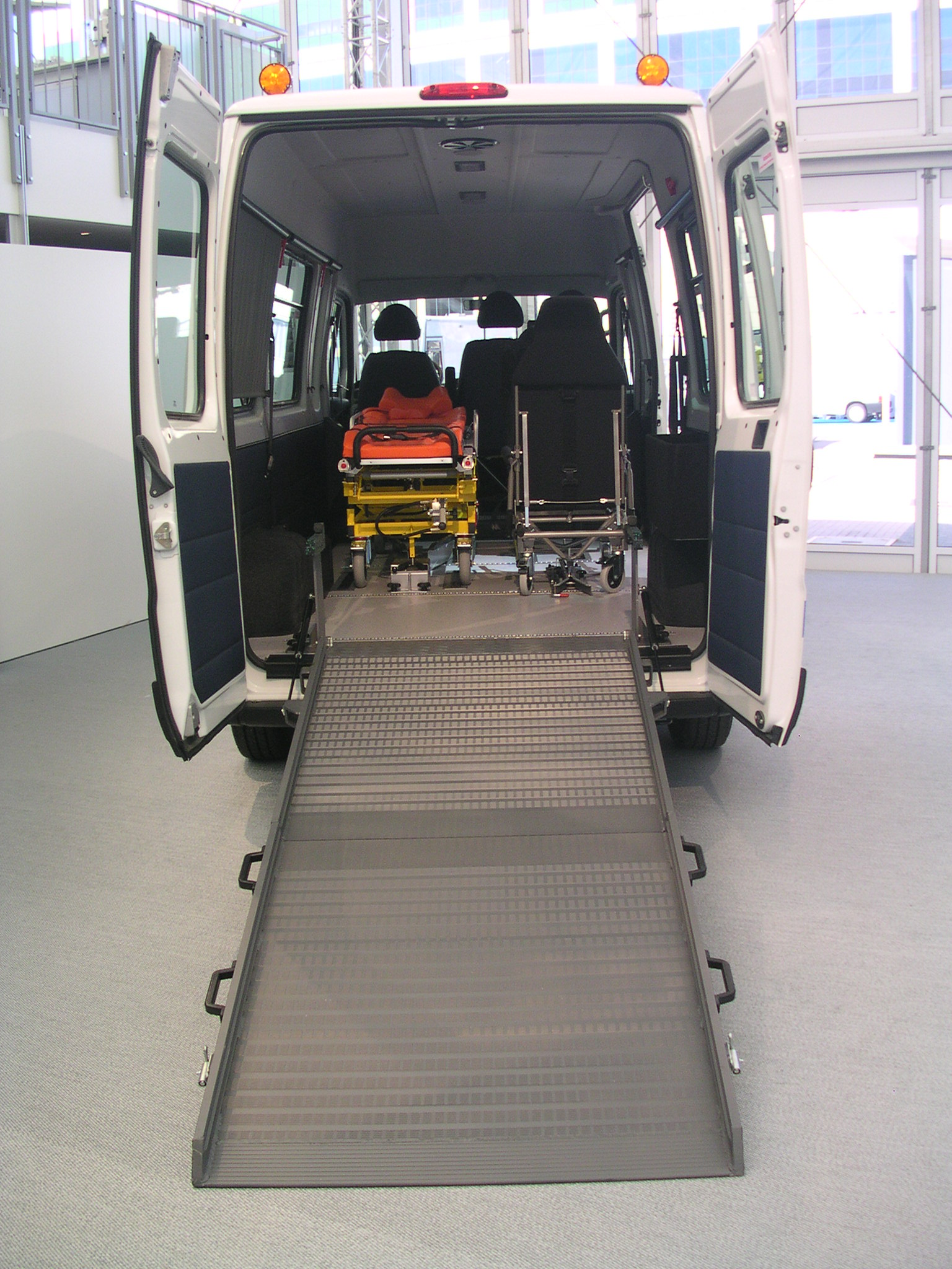 Behindertentransporter bei der PKW-IAA 2005 in Frankfurt